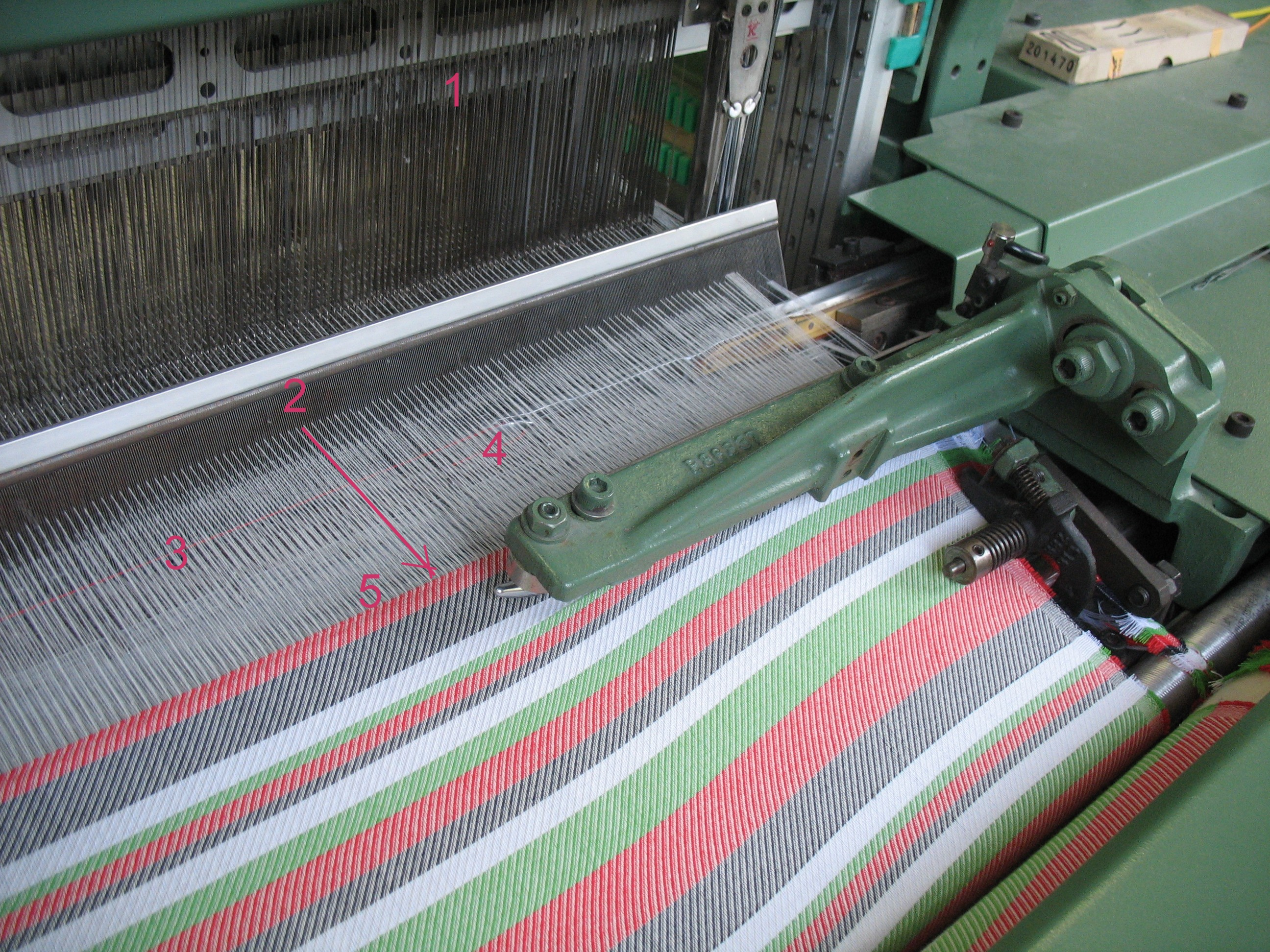 Weblade am Greifer-Webstuhl